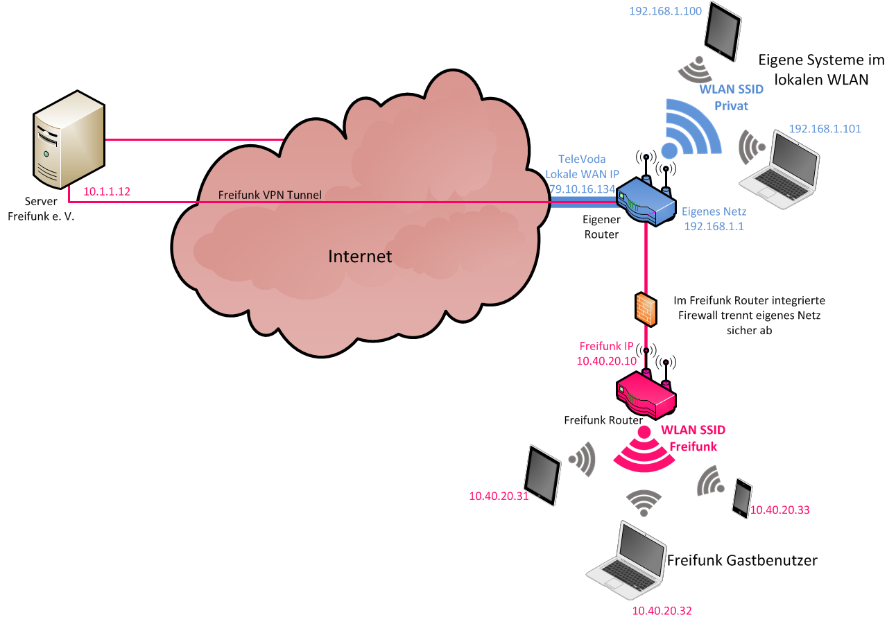 Technischer Aufbau eines Freifunk-Routers mit WLAN-Gastzugang